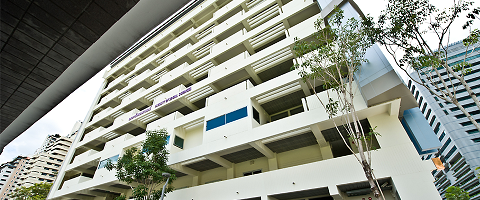 ssdsdfsf